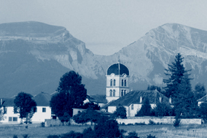 Photo du village de Monestier du Percy.